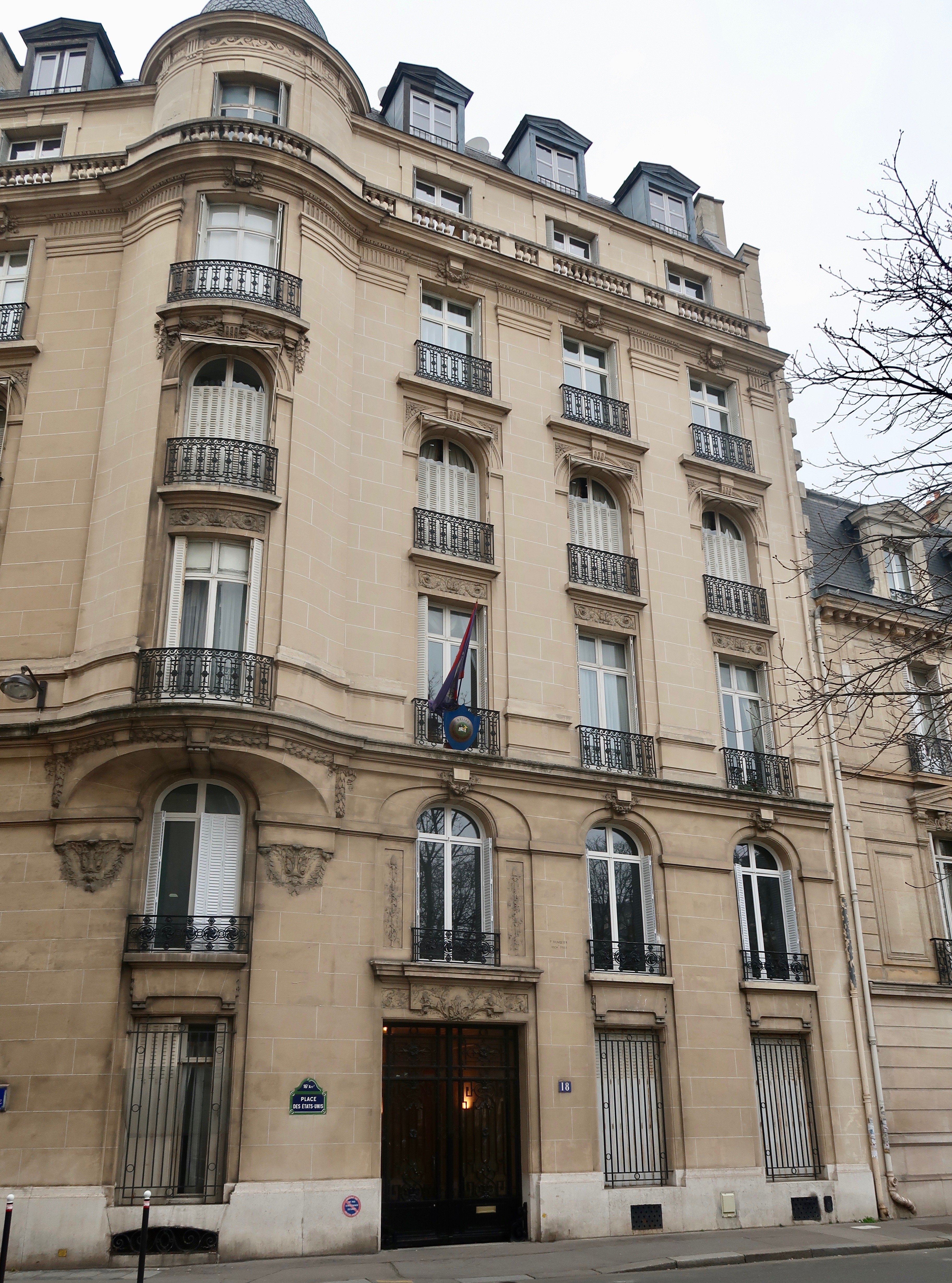 18 place des États-Unis (Paris, 16e), avec le drapeau et le blason du Bélize mais pas de plaque d'ambassade.